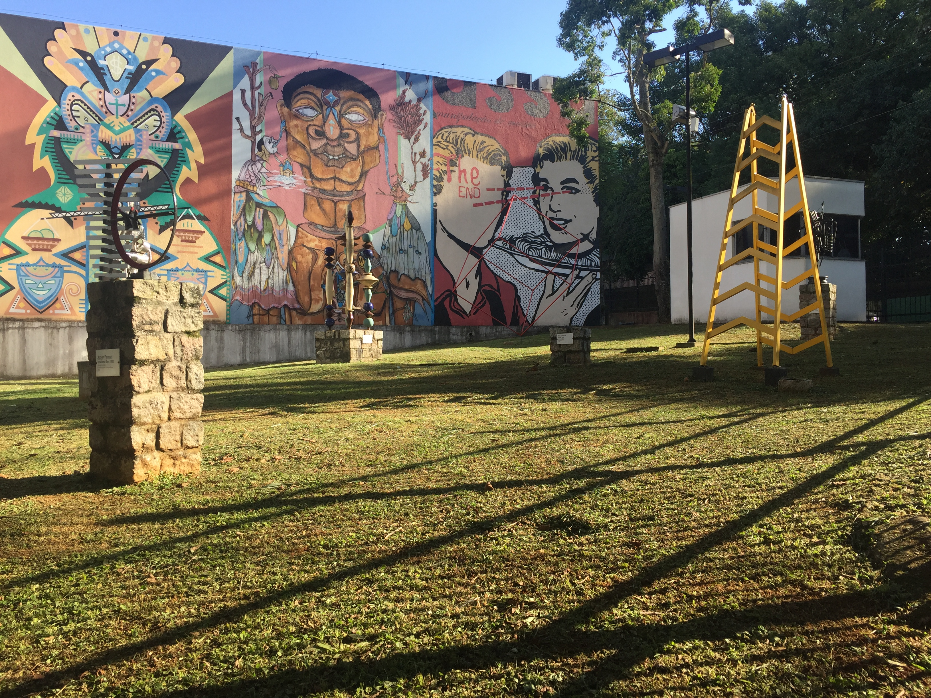 Jardim da frente da Pinacoteca de São Bernardo do Campo, com mural